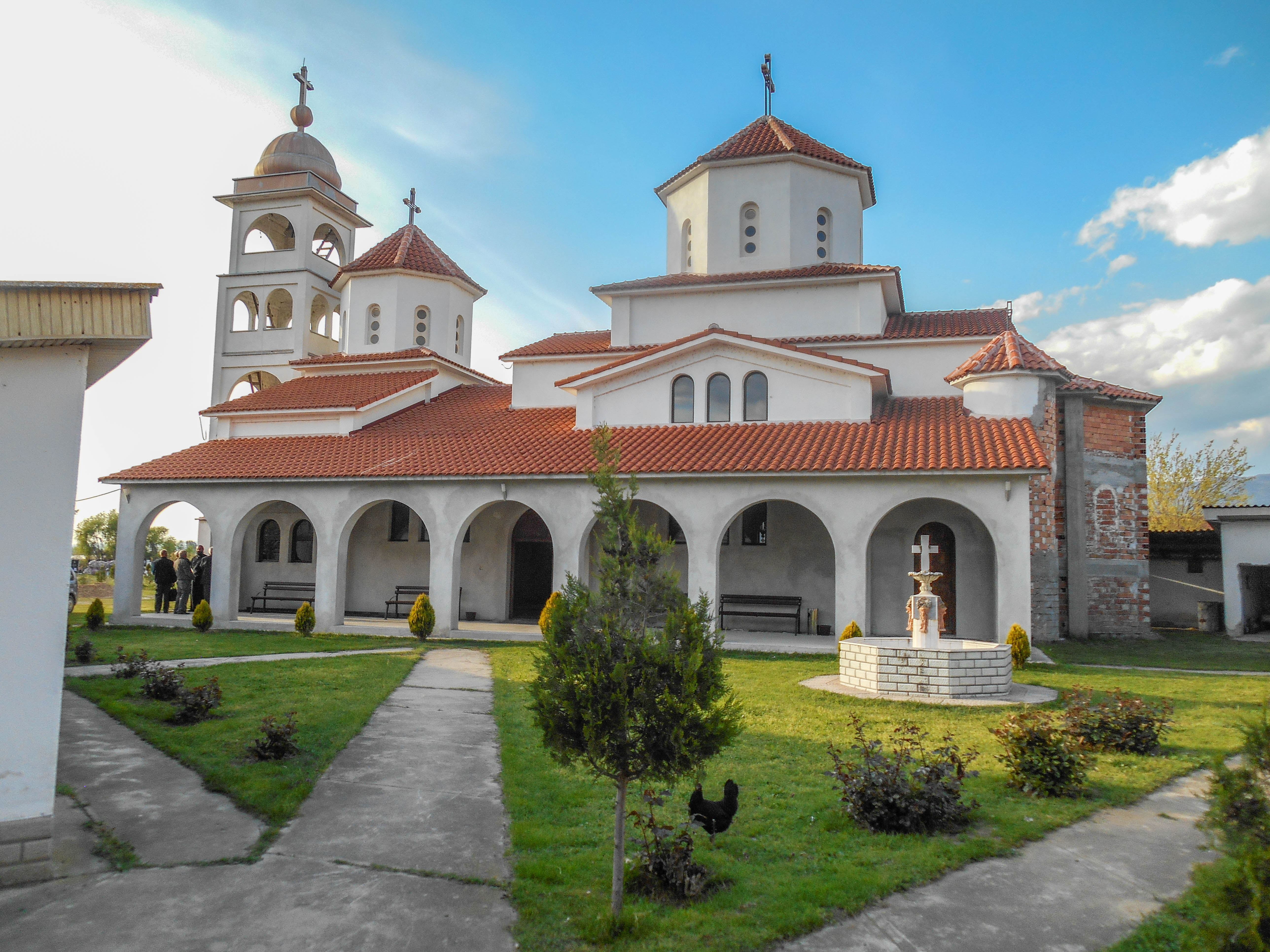 Црква „Св. Ѓорѓи“ - Турново